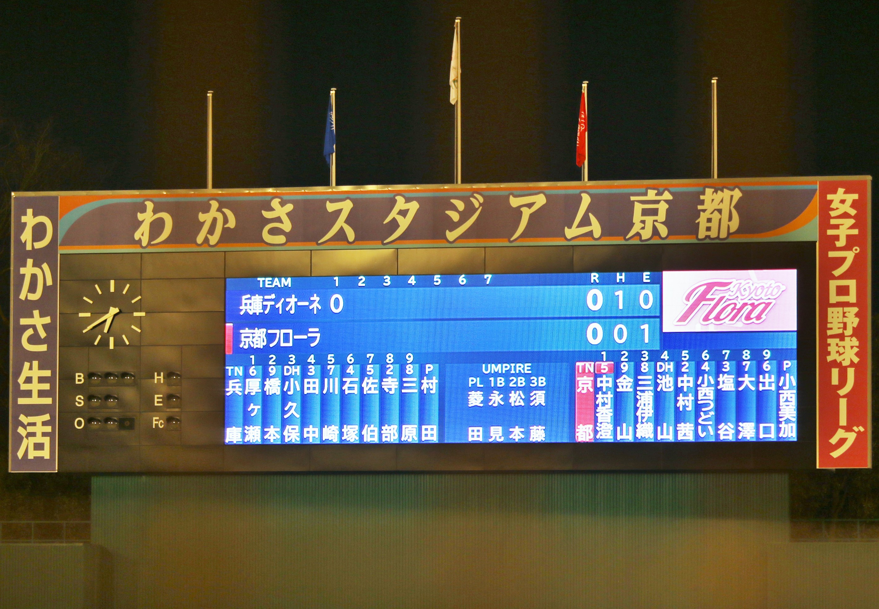 2015年、わかさスタジアム京都のスコアボード